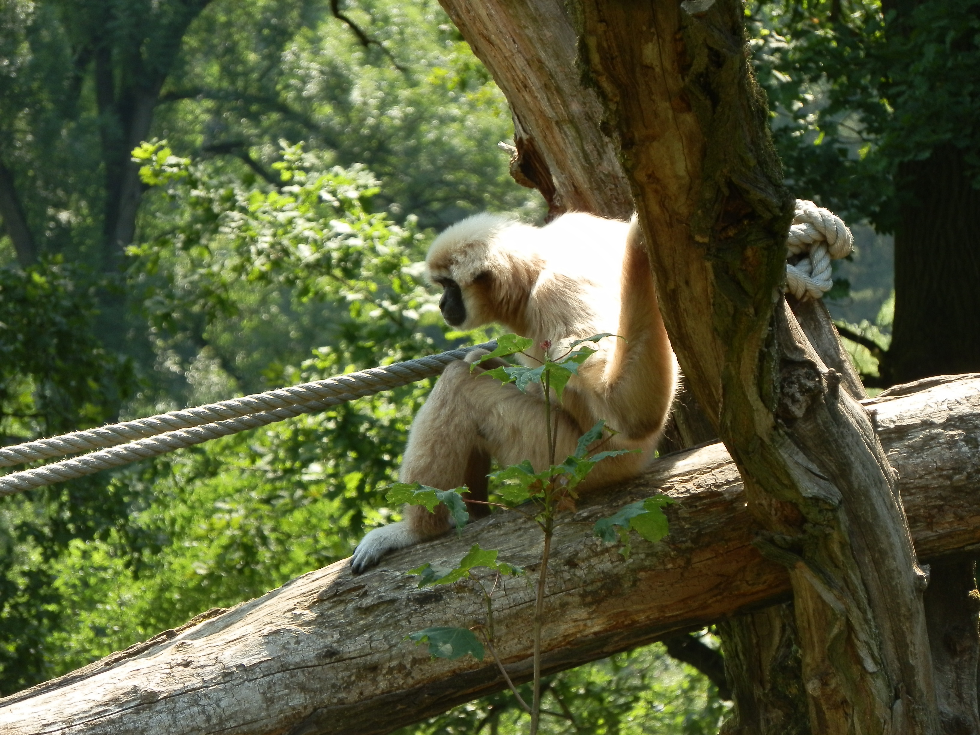 Monkey